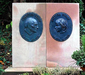 Grabstätte des Künstlers Christian Schad und Bettina Schad auf dem Friedhof in Keilberg (Germany, Bavaria)